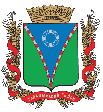 Герб Тальнівського району